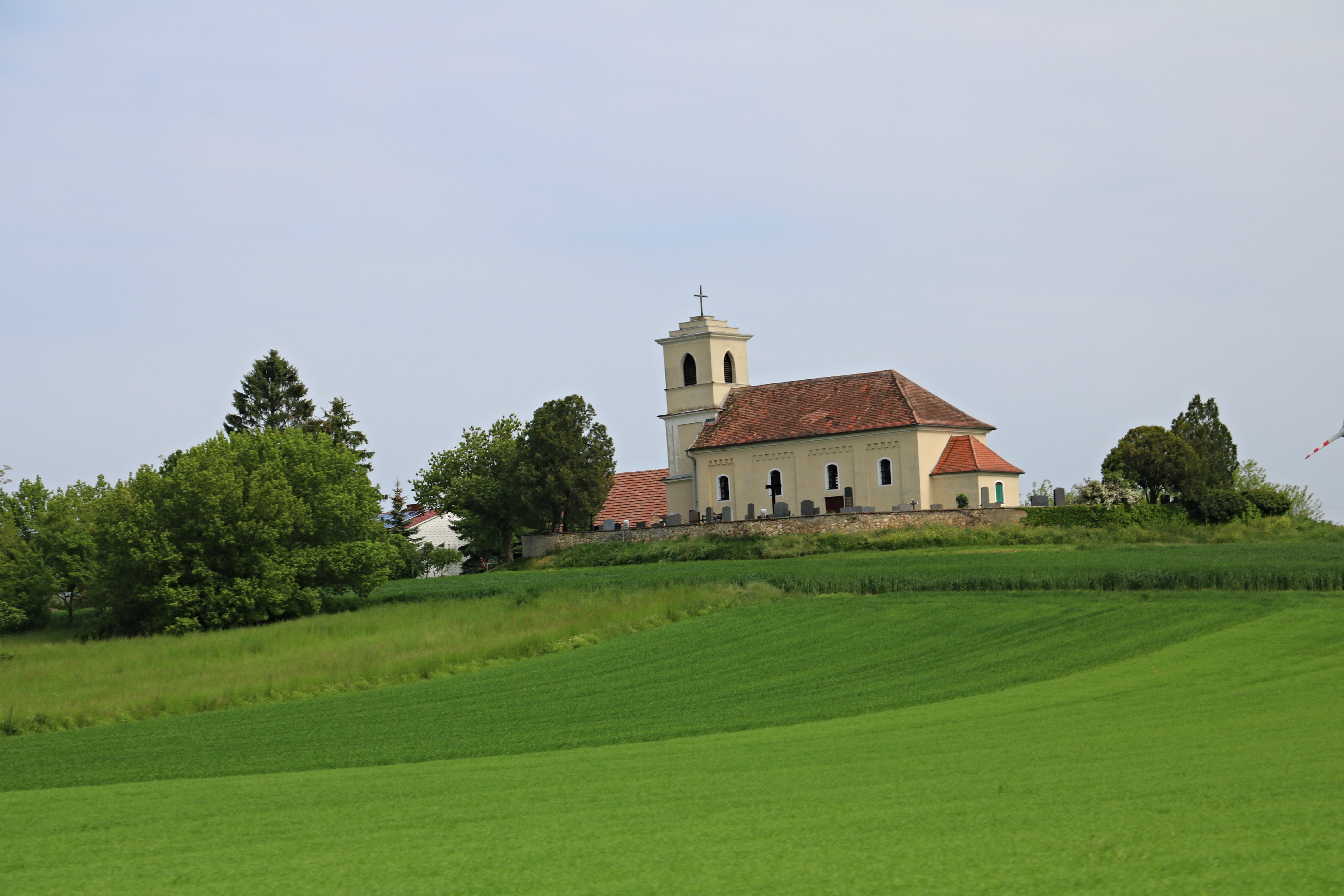 Kath. Filialkirche hl. Ulrich mit angeschlossenen Friedhof.